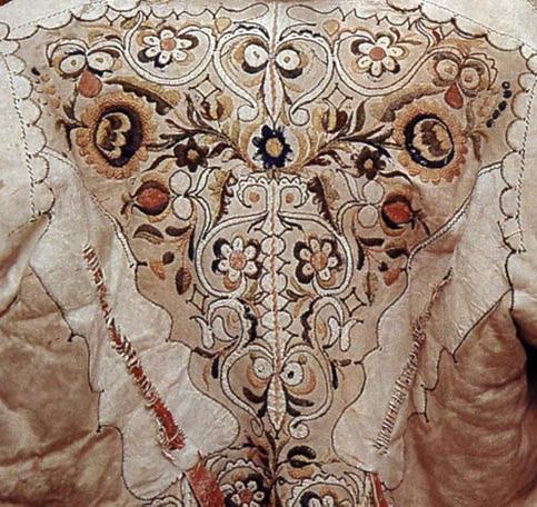 Ködmön fehér bőrrátéttel és színes selyemhímzéssel, szűcsmunka (Békés, Békés m., 19. sz. közepe)